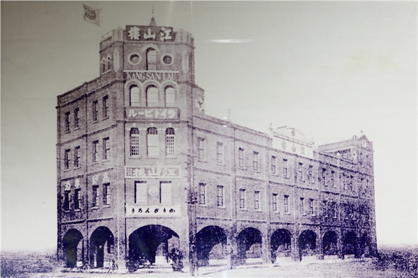 中文（香港）: 日治時期（1895-1945）的江山樓